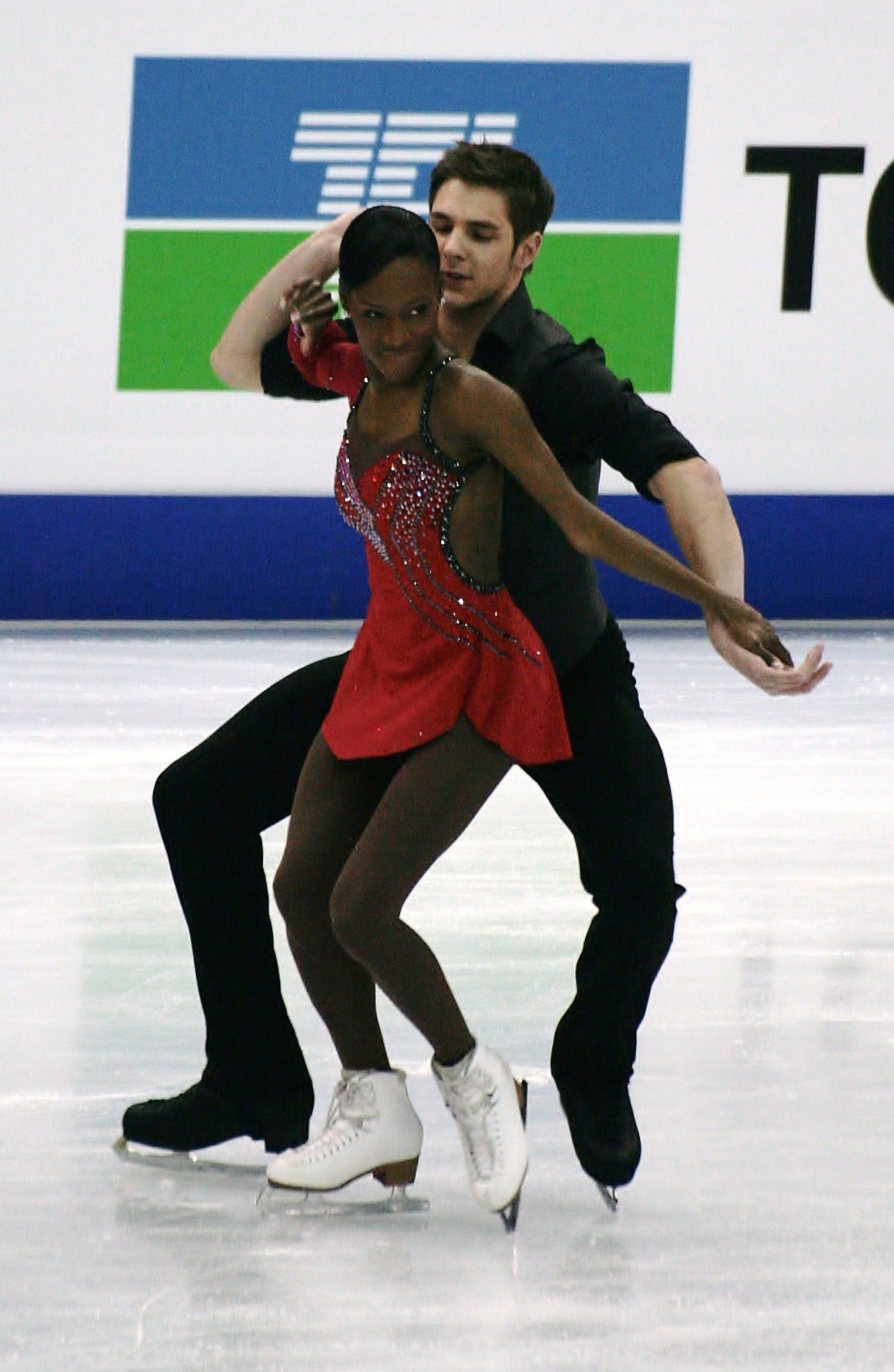 Ванесса Джеймс и Морган Сипре (Франция) на чемпионате мира по фигурному катанию 2012